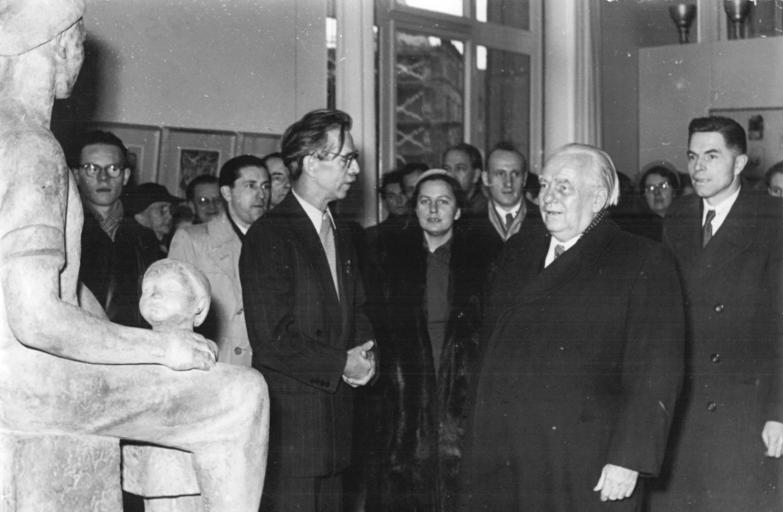 Berlin, Ausstellung, Nagel, Hahne, Pieck Zentralbild Sturm 1.12.51 "Künstler schaffen für den Frieden" Die große Deutsche Kunstausstellung "Künstler schaffen für den Frieden" wurde am 1.12.51 in den Räumen der Staatlichen Museen in Berlin in Anwesenheit von Präsident Pieck und Ministerpräsident Grotewohl feierlich eröffnet. UBz: Präsident Pieck bei seinem Rundgang durch die Ausstellung. Links Prof. Nagel, in der Mitte die Bildhauerin Ruthild Hahne. [Ziller (Mitte)] [Otto Nagel, Ruthild Hahne, Wilhelm Pieck Sperrvermerk: Ziller] Abgebildete Personen: Nagel, Otto Prof.: Maler, Präsident der Akademie der Künste (AdK), Nationalpreisträger, Vaterländischer Verdienstorden (VVO) in Gold, DDR (GND 118586300) Hahne, Ruthild: Bildhauerin, Dozentin an der Hochschule für Bildende Künste, DDR (GND 122152131) Pieck, Wilhelm: Präsident, Politbüro der SED, Vorsitzender der KPD, DDR